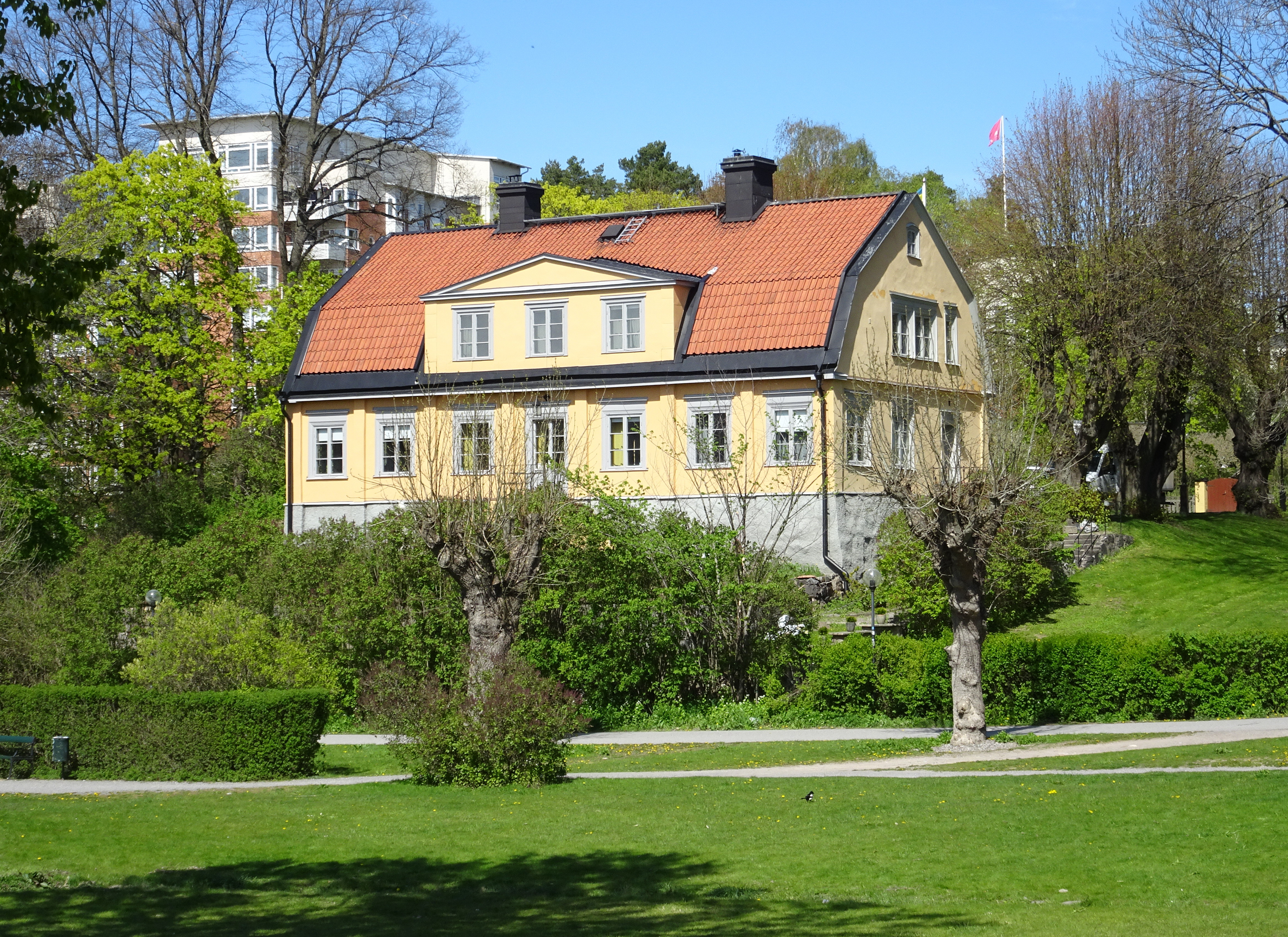 Lilla Frösunda, huvudbyggnad